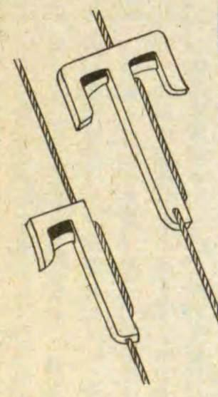 凧の糸に仕込む雁木